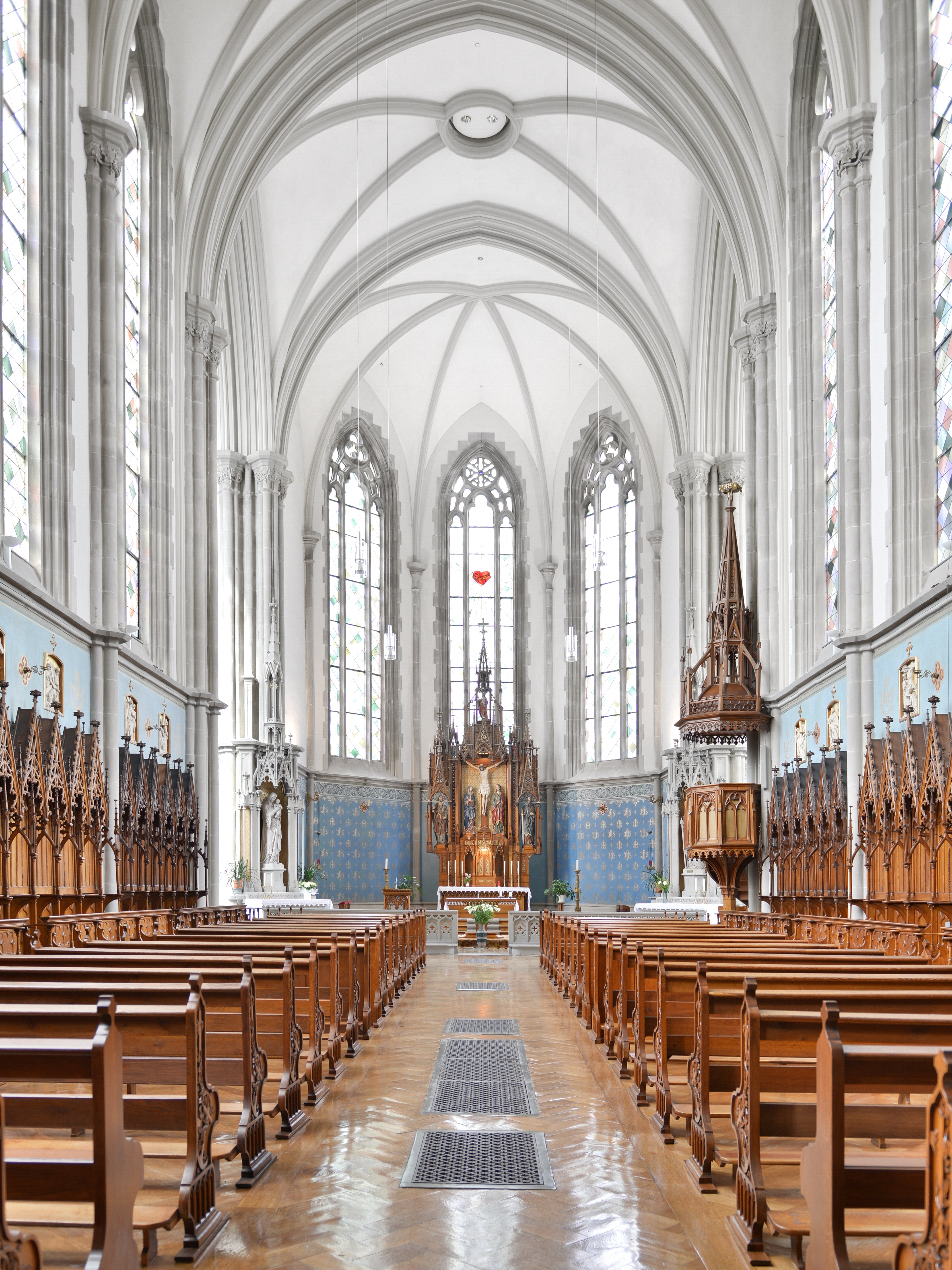 Klosterkirche zum Heiligsten Herzen Jesu in Riedenburg an der Arlbergstrasse 88-96 in Bregenz, Vorarlberg. Neugotische Klosterkirche erbaut 1862–1865